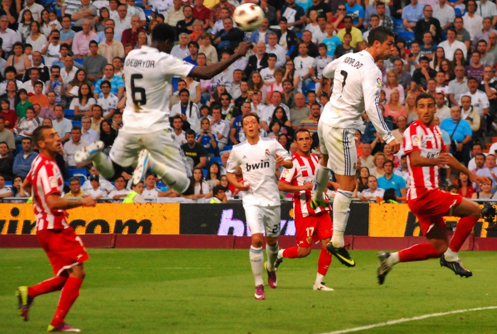 Tête d'Emmanuel Adebayor lors d'un match entre le Real Madrid et l'UD Almería.